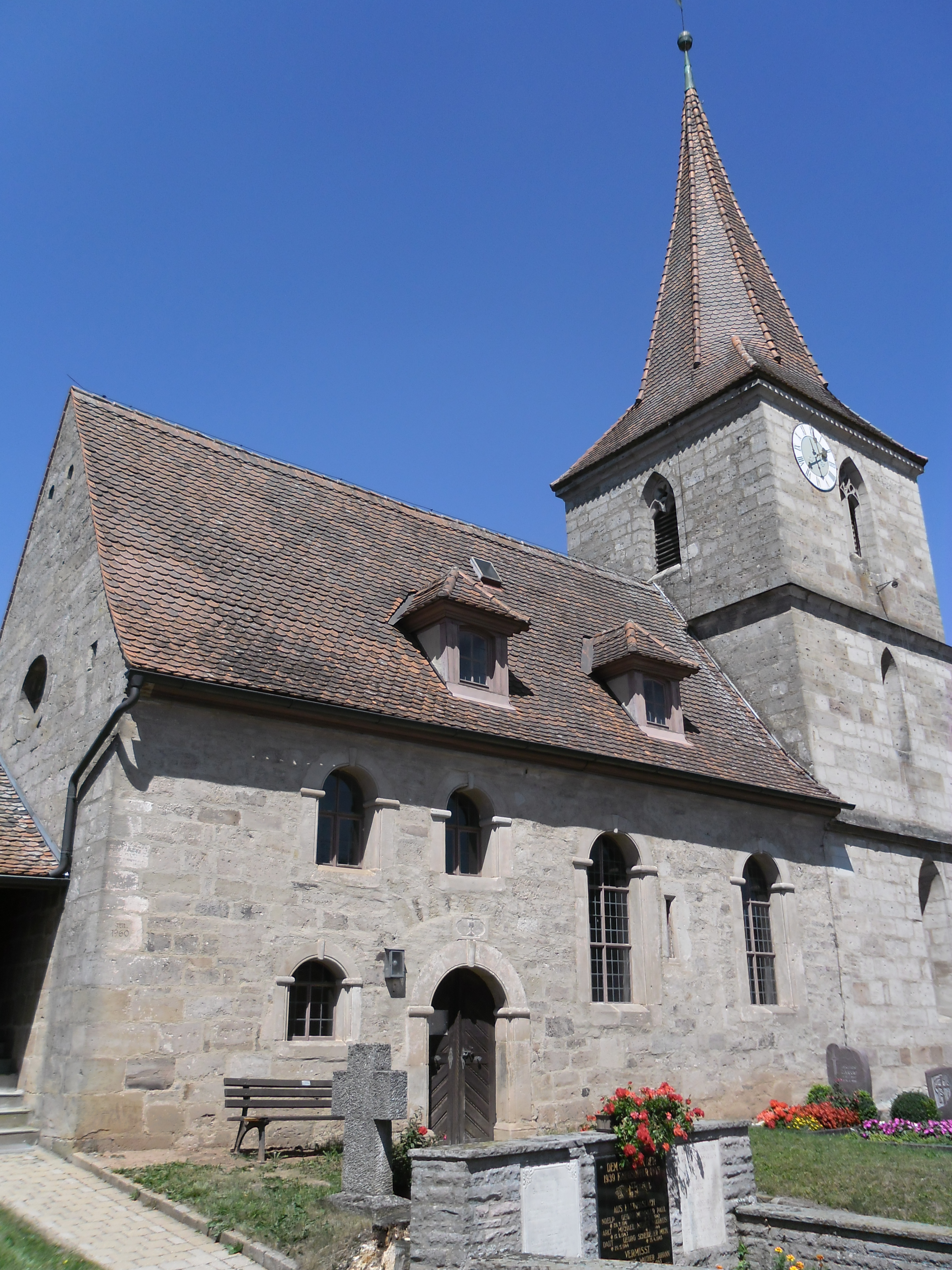 Martinskirche Kleinhaslach 05